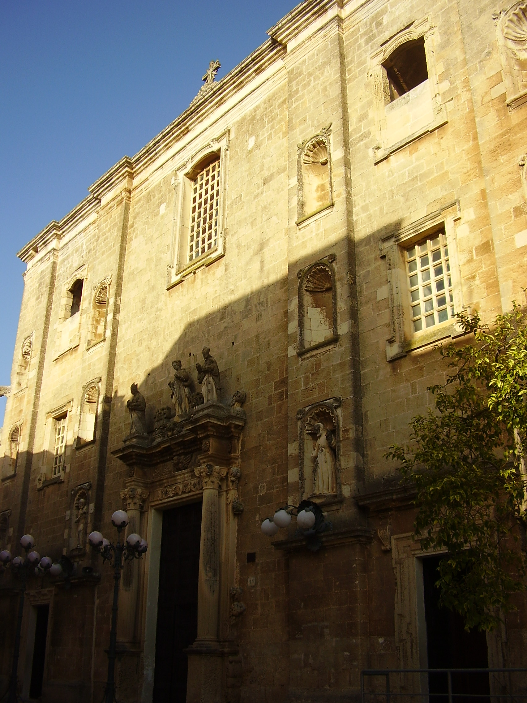 Chiesa Santa Domenica Scorrano, Lecce